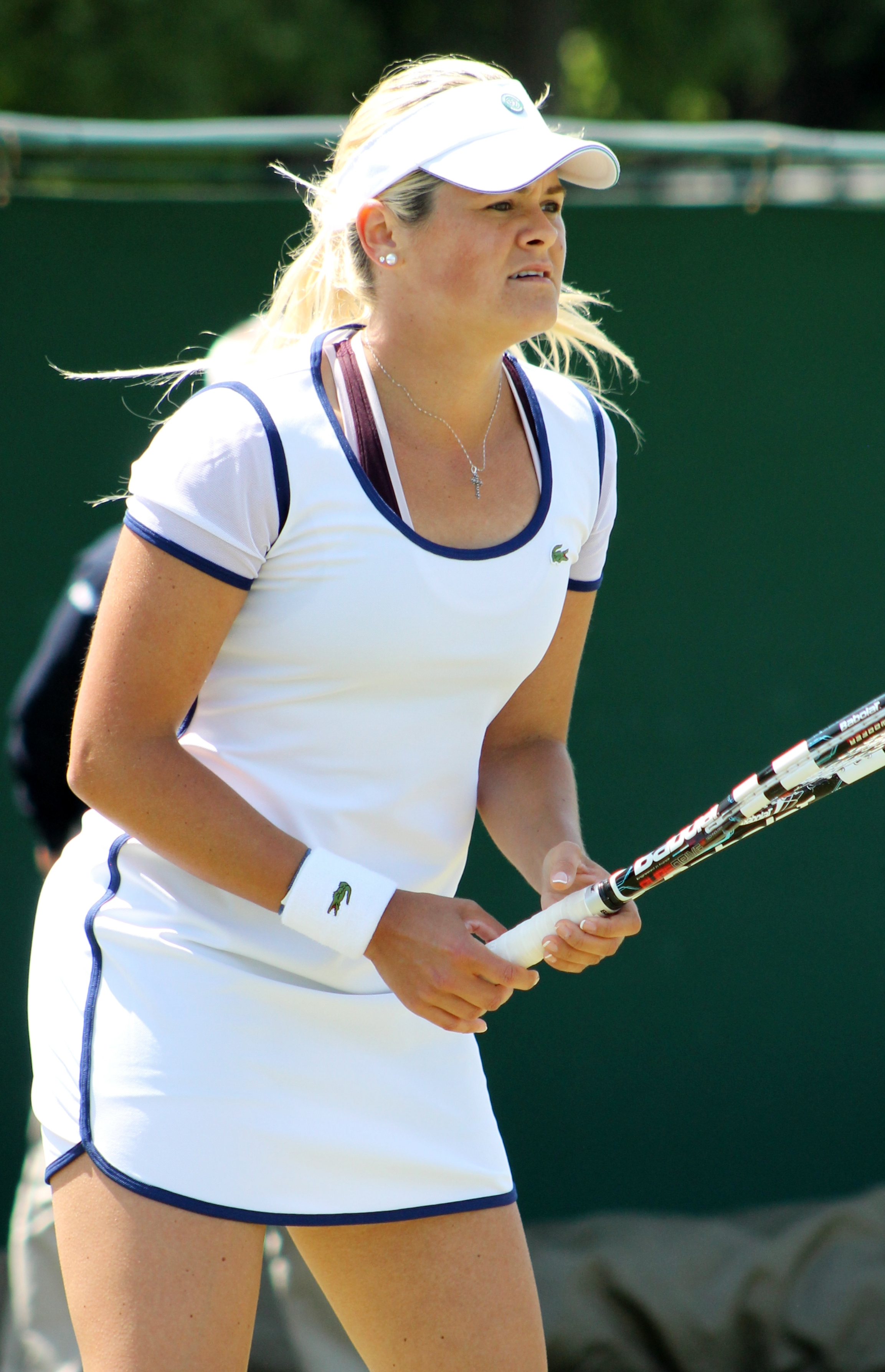 Wozniak WMQ14 (10)